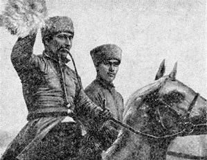 Sur-papaq - Azerbaijani national horse game